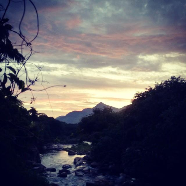 Rio Macacu cortando o Centro do Valério